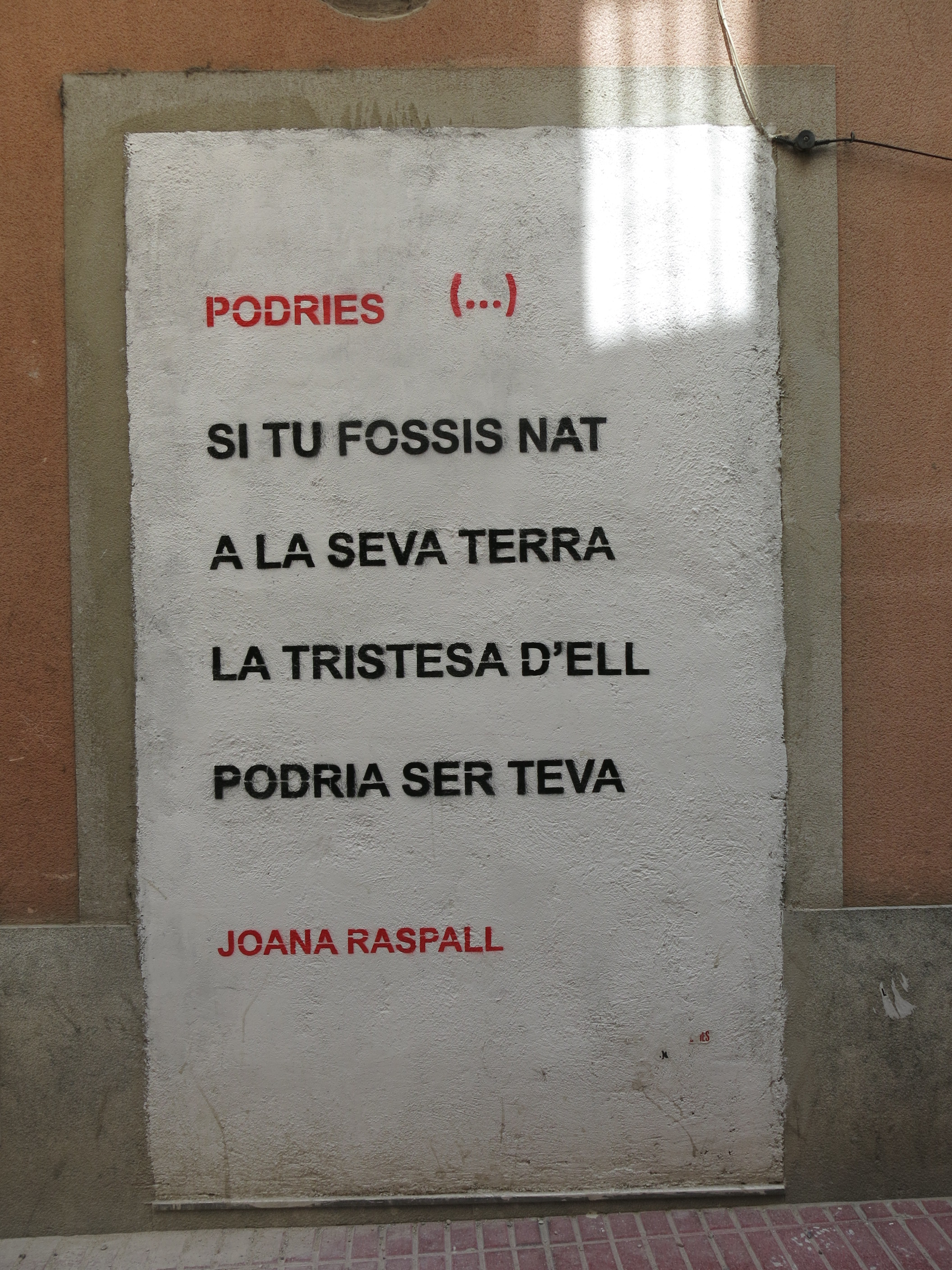 Podries, poema de Joana Raspall, c. Sant Antoni 12 (Valls)